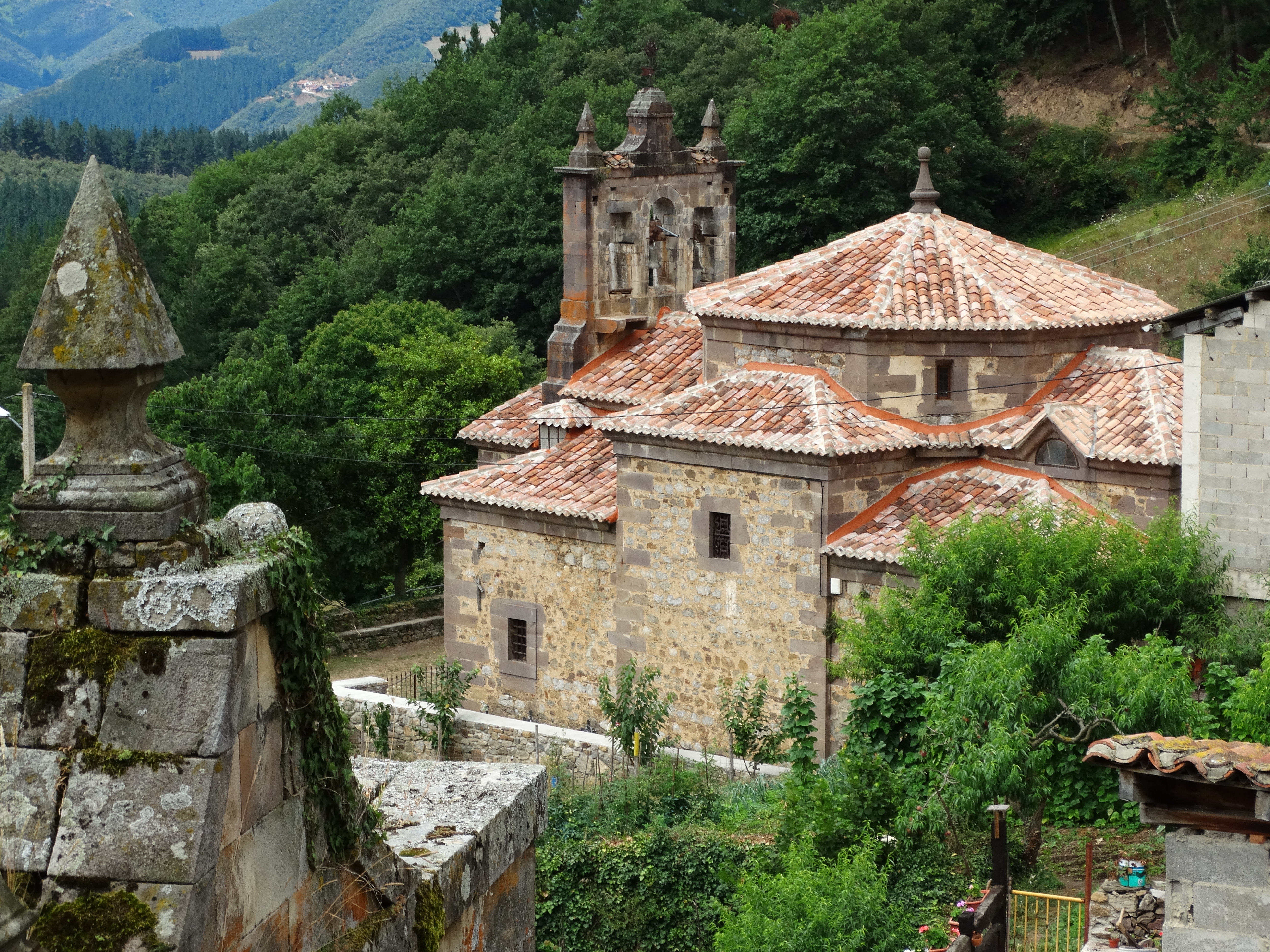 Salarzón es una localidad del municipio de Cillorigo de Liébana, en la comarca de Liébana (Cantabria, España). Iglesia neoclásica de principios del siglo XIX mandada construir por el conde de la Cortina Vicente Gómez de la Cortina y Salceda.